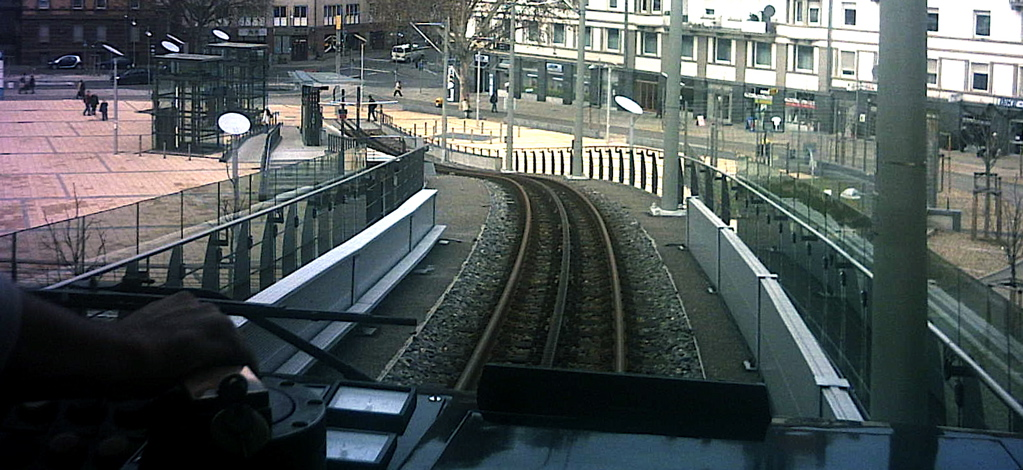 Blick aus dem Führerstand der Zahnradbahn